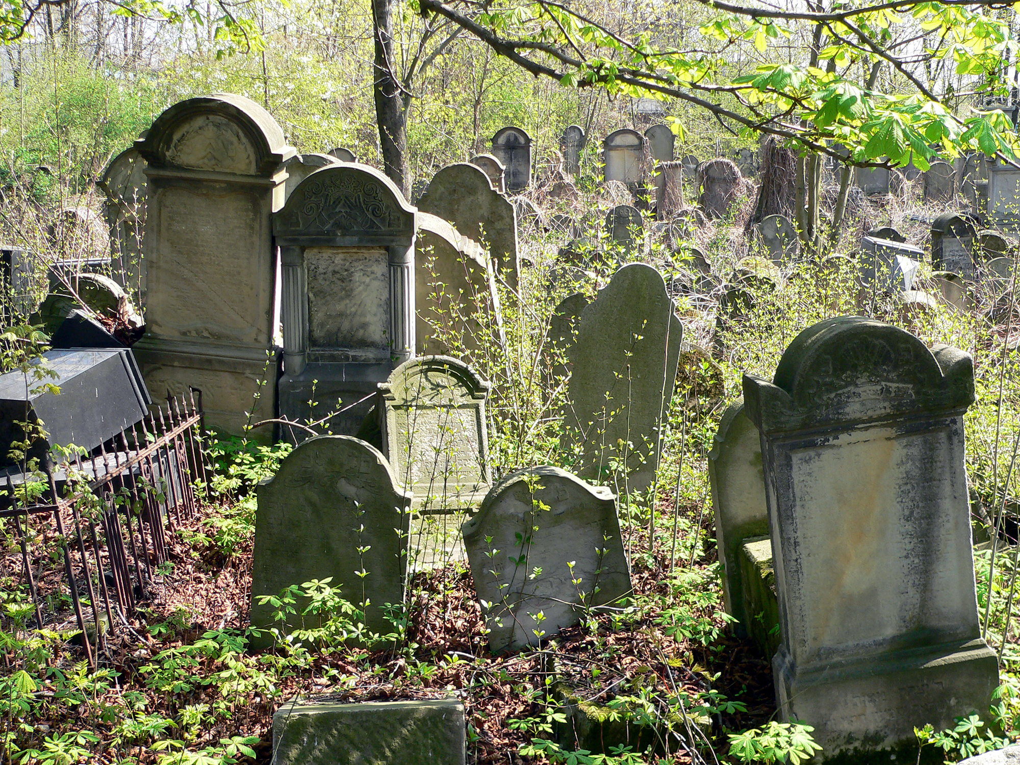 Cmentarz żydowski w Tarnowie ul.Szpitalna,Słoneczna